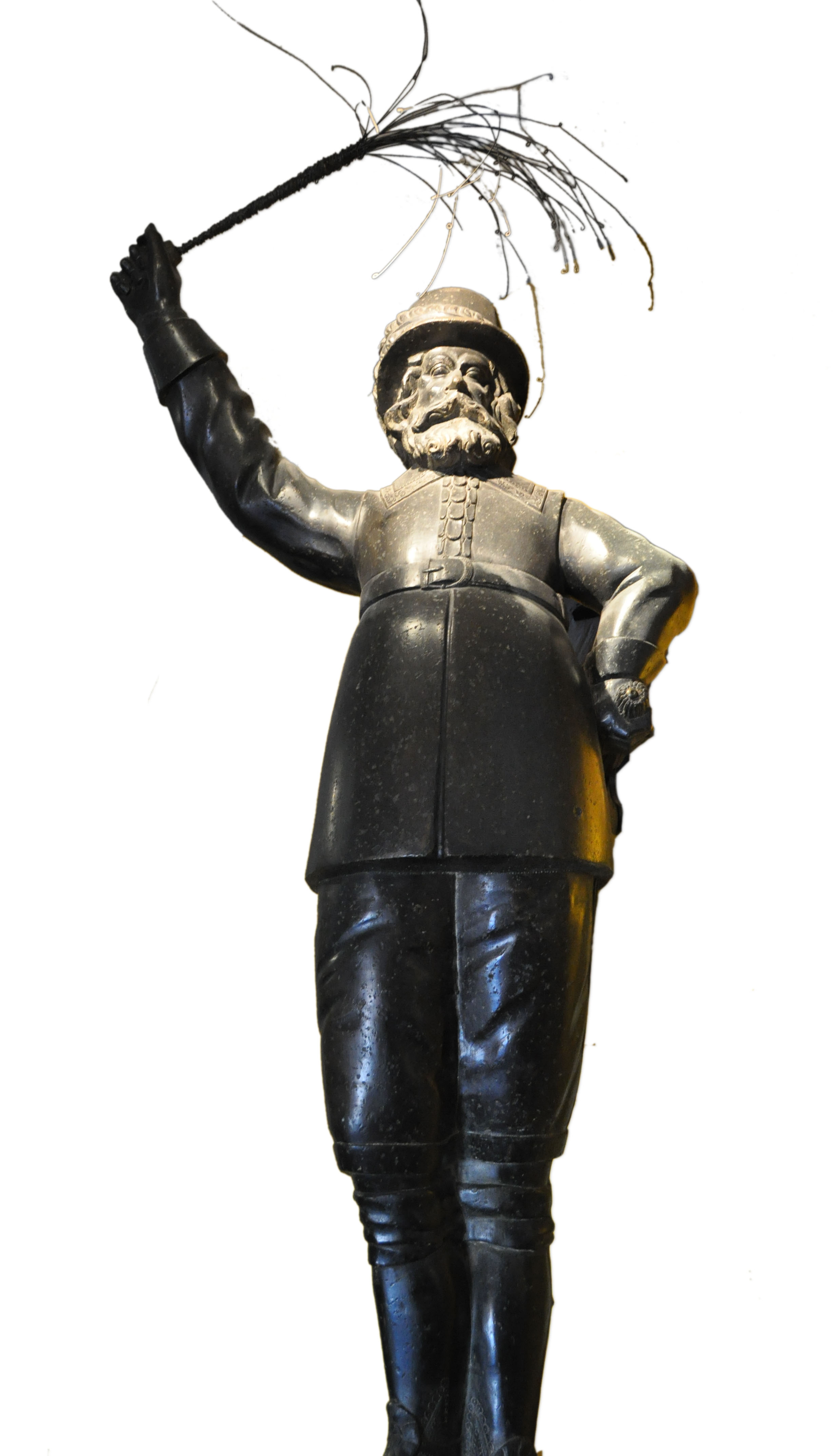 Kopparmatte